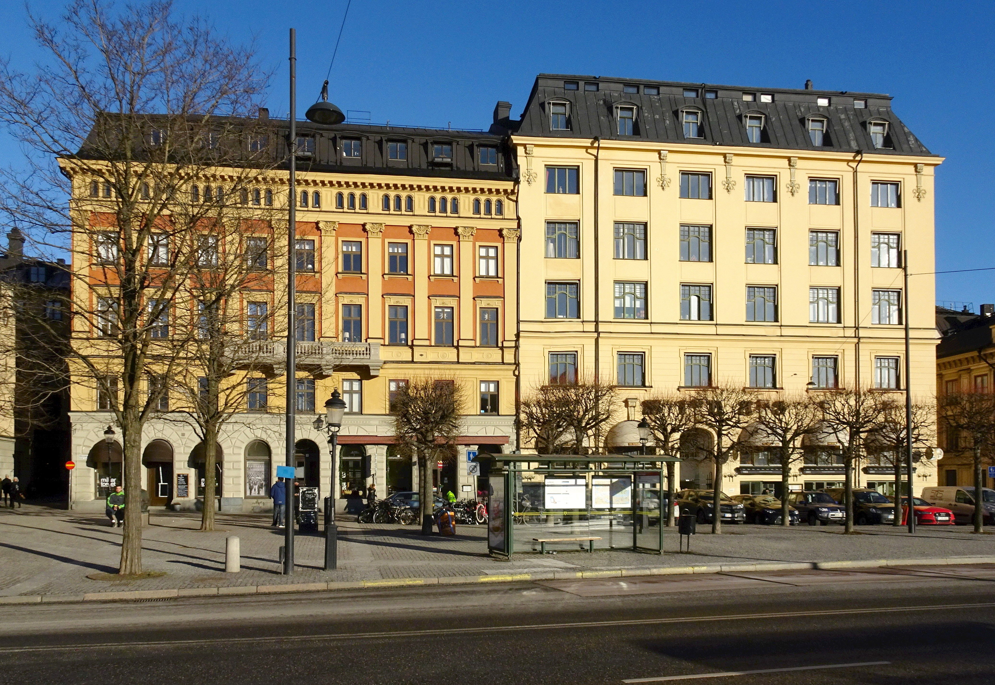 Mälartorget med fastighet Midas 5 (t.h.) och 7.